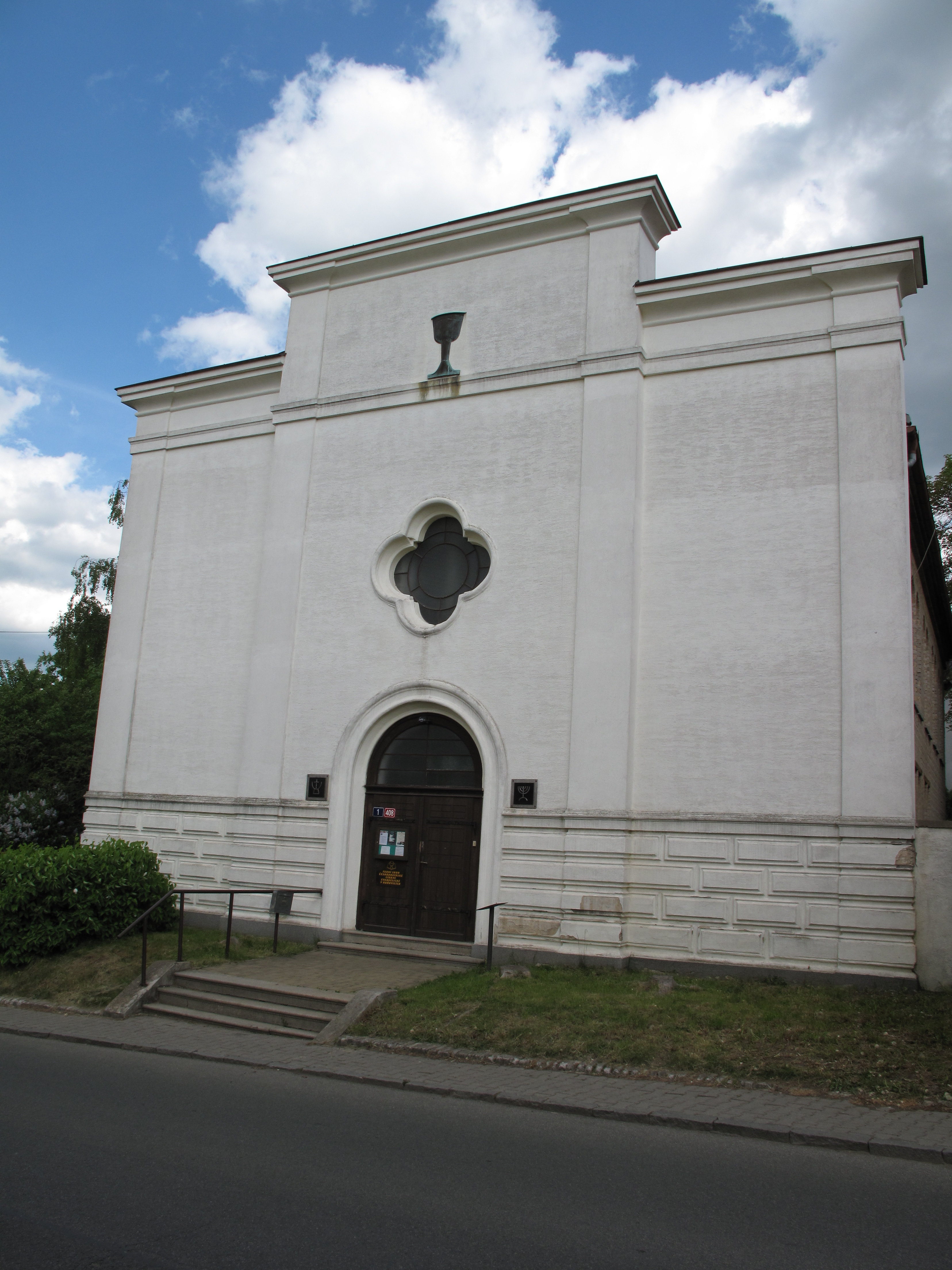 Fasáda synagogy v Hořovicích. Okres Beroun, Česká republika.